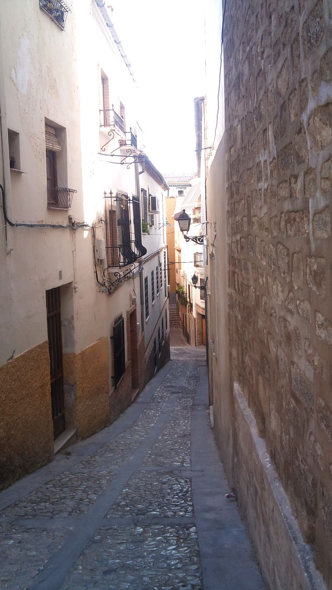 Calle de Santa Cruz, en pleno barrio de la Judería de Jaén